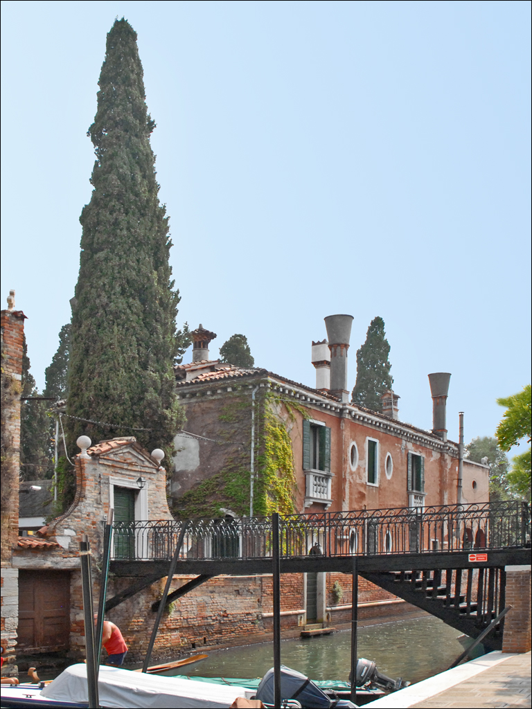 L'entrée de la maison "Giardino Eden" (le jardin d'Eden) Cette propriété est composée d'une maison principale et de deux maisons secondaires situées sur un vaste terrain donnant au sud sur la lagune de Venise et dont l'entrée se trouve 138 Rio della Croce. Elle est située sur l'île de la Giudecca, près de l'église du Rédempteur et de la prison aujourd'hui désaffectée dont elle est mitoyenne. Elle a été achetée par un couple d'aristocrates anglais : Sir Frederic Eden (1828-1916) et son épouse Caroline (1837-1928) en 1884 qui l'a mise en valeur en créant un jardin devenu célèbre et dont F. Eden a raconté l'histoire dans un ouvrage publié en 1903. En 1928, à la mort de son épouse Caroline, la propriété a changé plusieurs fois de propriétaire. Le dernier d'entre eux a été le peintre autrichien Hundertwasser qui l'a occupée à partir de 1979 jusqu'à sa mort en 2000. Aujourd'hui elle appartient à la fondation Hundertwasser mais il n'est pas possible de la visiter. voir un album de J.P. Dalbéra sur Hundertwasser Le jardin est cité dans l'ouvrage "Venise, insolite et secrète", de Thomas Jonglez et Paola Zoffoli Editions Jonglez, juin 2011 pages 364 et 365, Références du livre sur le jardin : "Un jardin à Venise" Titre original : "A garden in Venice" de Frédéric Eden publié pour la première fois en 1903 par la revue "Country Life et Georges Newnes Publié en fac similé par Frances Lincoln adresse Traduit de l'anglais et présenté par Marie-Thérèse Weal Edité en France par les éditions Actes Sud, Arles, 2005 Edité en Italie par les éditions Pendragon, Bologne (Un giardino a Venezia)